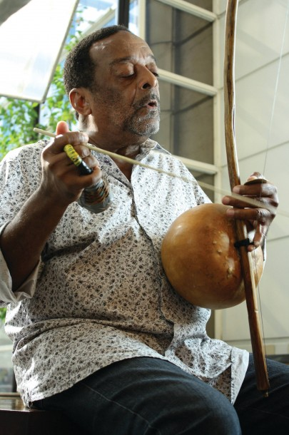 Músico brasileiro Naná Vasconcelos em imagem do acervo da TV Brasil.